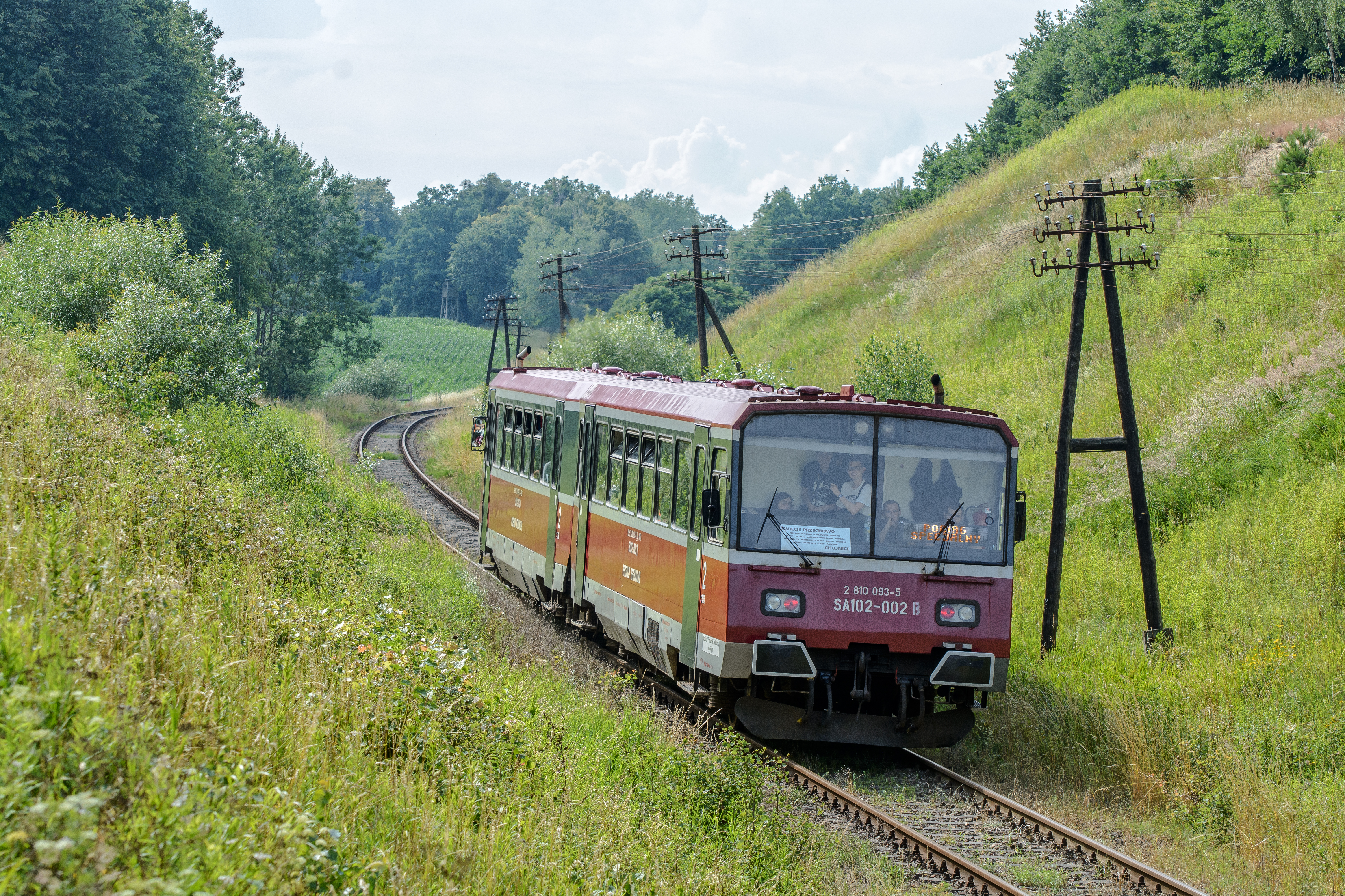 Spalinowy zespół trakcyjny SA102-002 podczas swojego ostatniego kursu z pasażerami jako pociąg specjalny Bory Tucholskie na linii kolejowej nr 208 między przystankiem osobowym Leosia a przystankiem osobowym Drzycim.